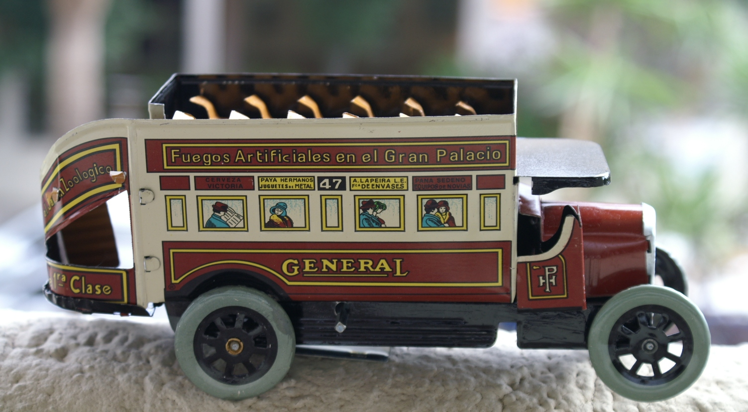 Reproducción de un Juguete Payá de principios del siglo XX